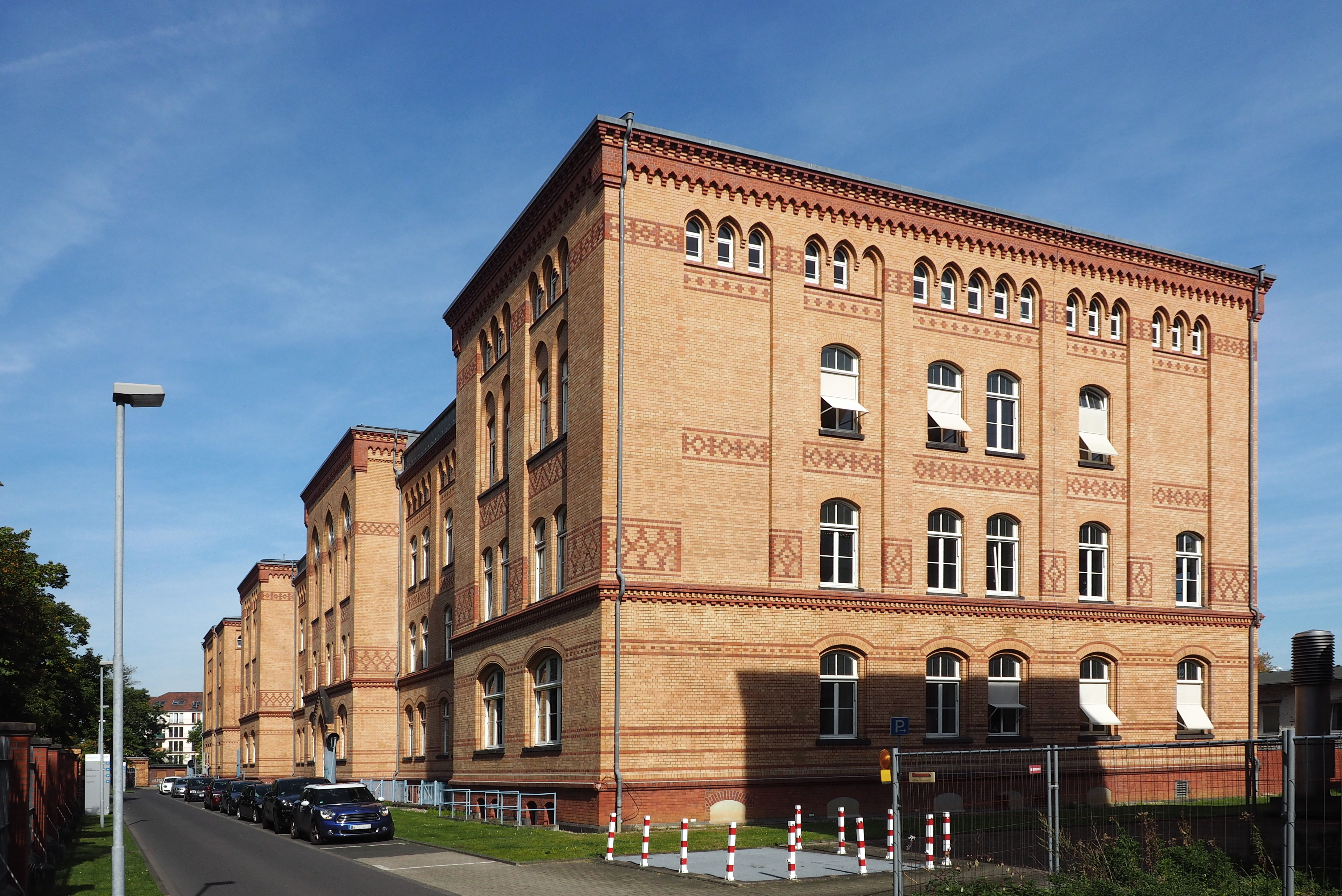 Mittelbau des Gebäudes Himmelgeister Straße - Hauptgebäude (Gebäude 18.13) der Westdeutschen Kieferklinik seit 2005